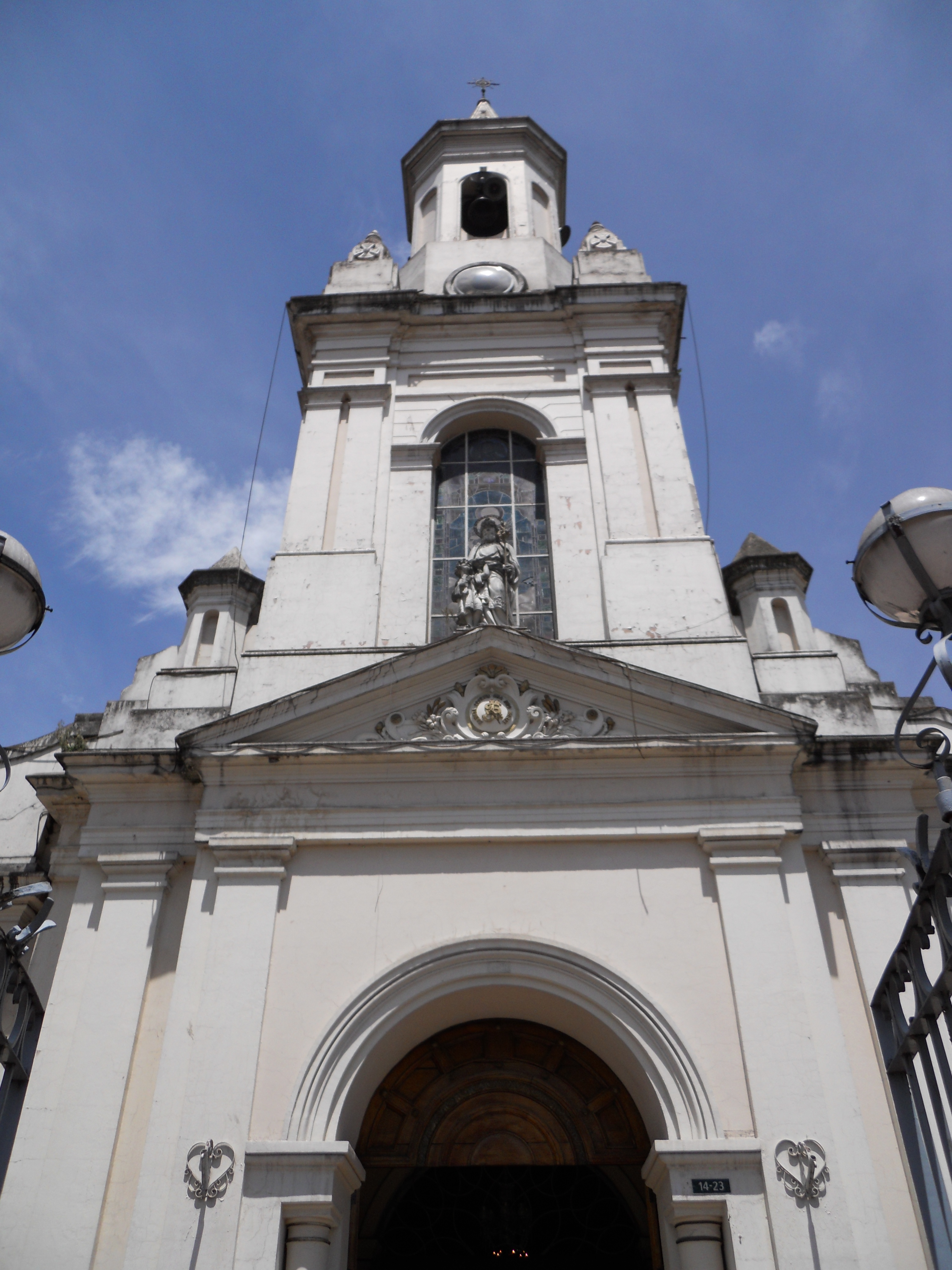 Bogotá fachada y torre de la iglesia de La Capuchina, en la carrera Trece con calle Catorce.